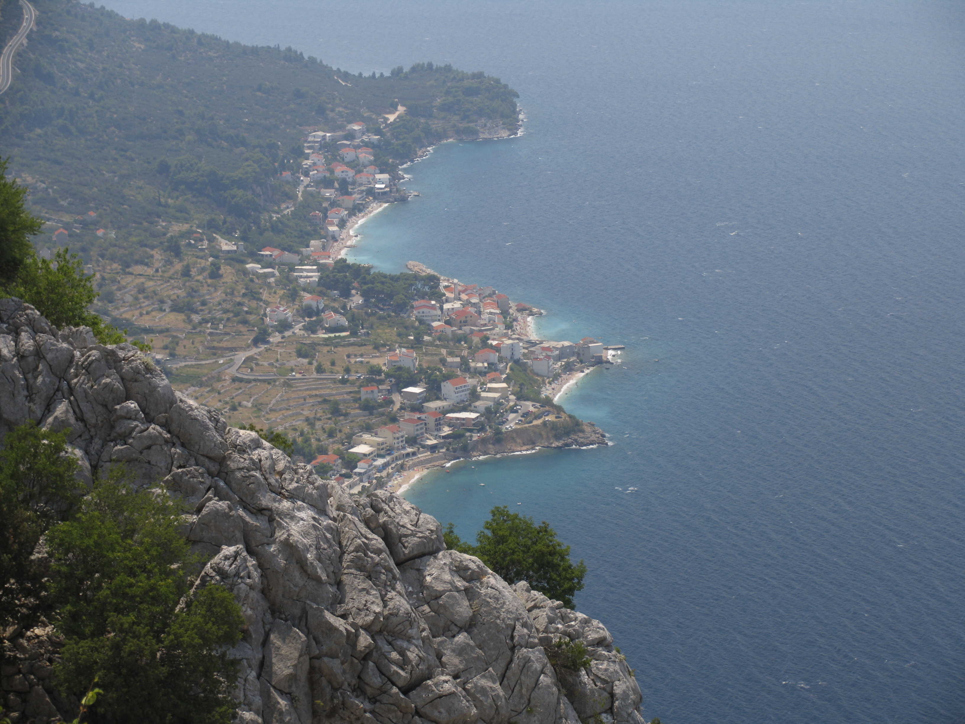 Drašnice